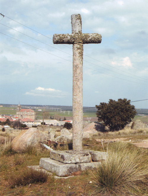 Cruz de Santiago El Mayor